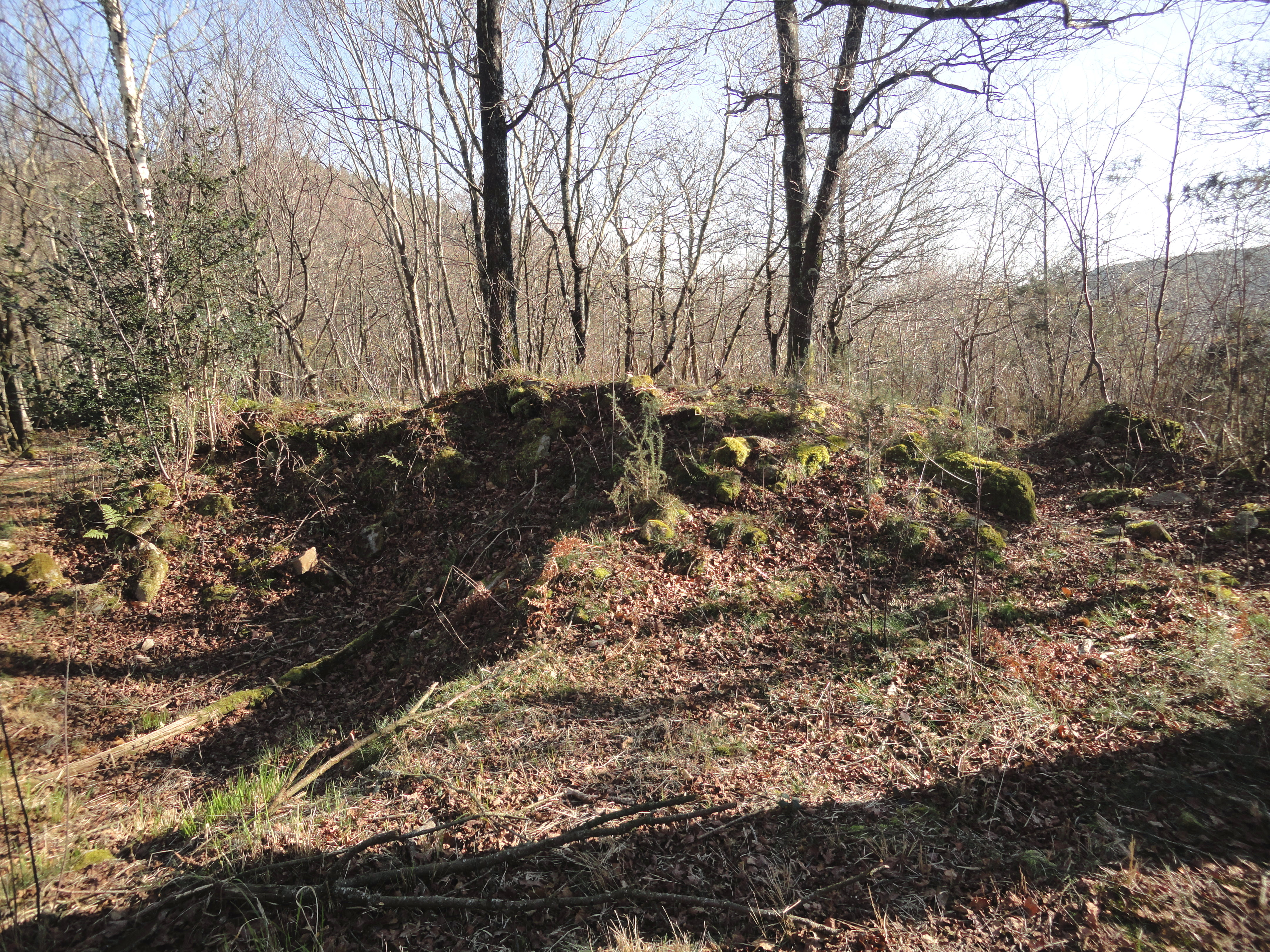 Arkutxa trikuharria